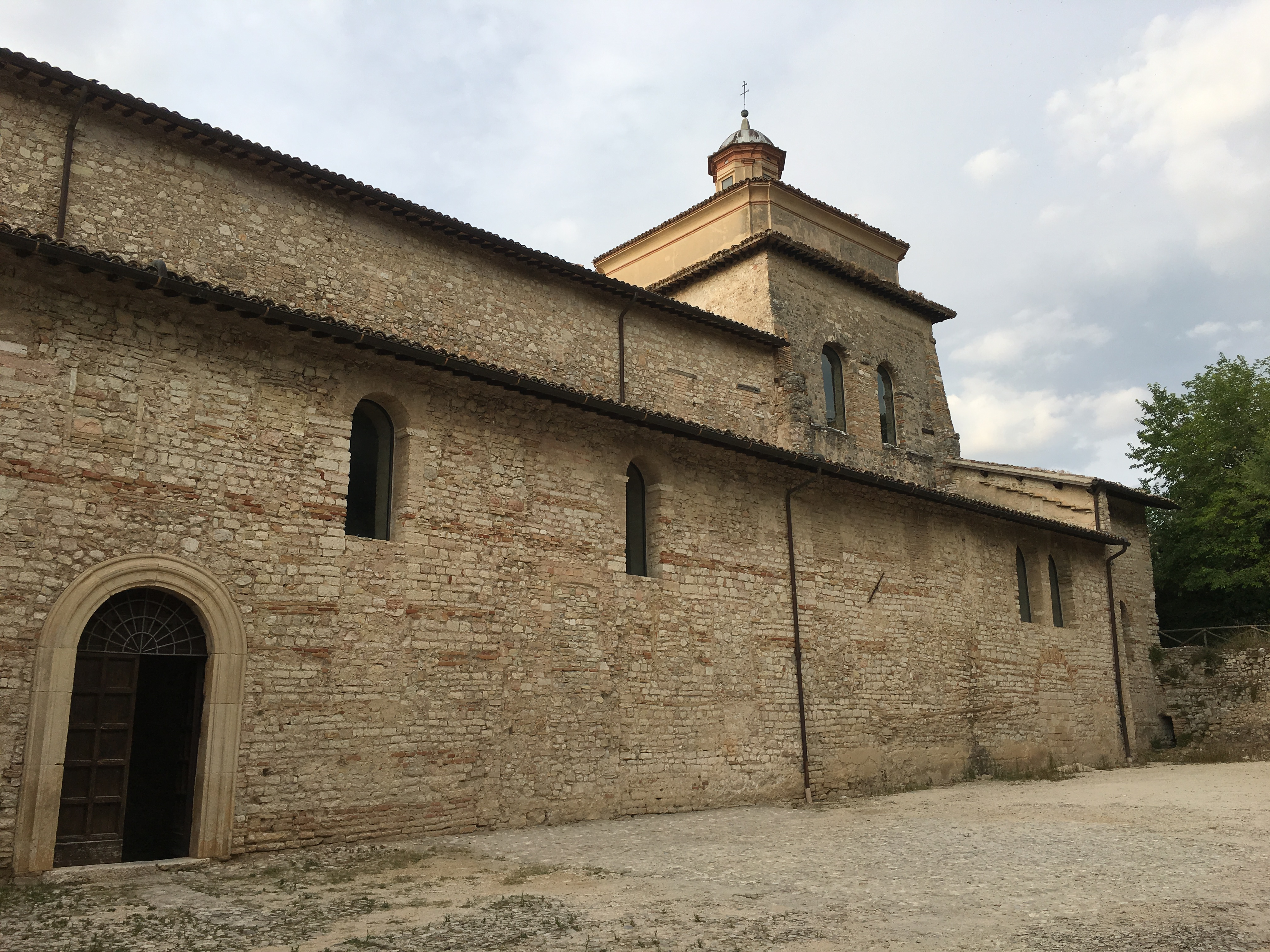 San Salvatore. Spoleto